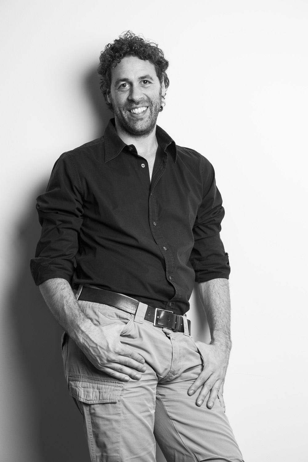 l'attore e doppiatore italiano Diego Casalis